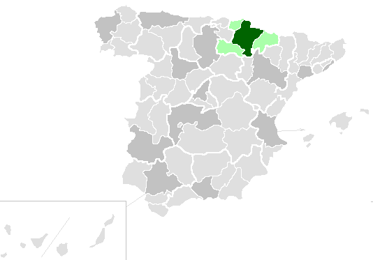 Territorio de la Archidiócesis de Pamplona, Mapa